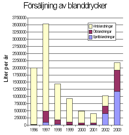 Diagram över systembolagets försäljning av blanddrycker (populärt kallat alkoläsk) från 1996-2003.